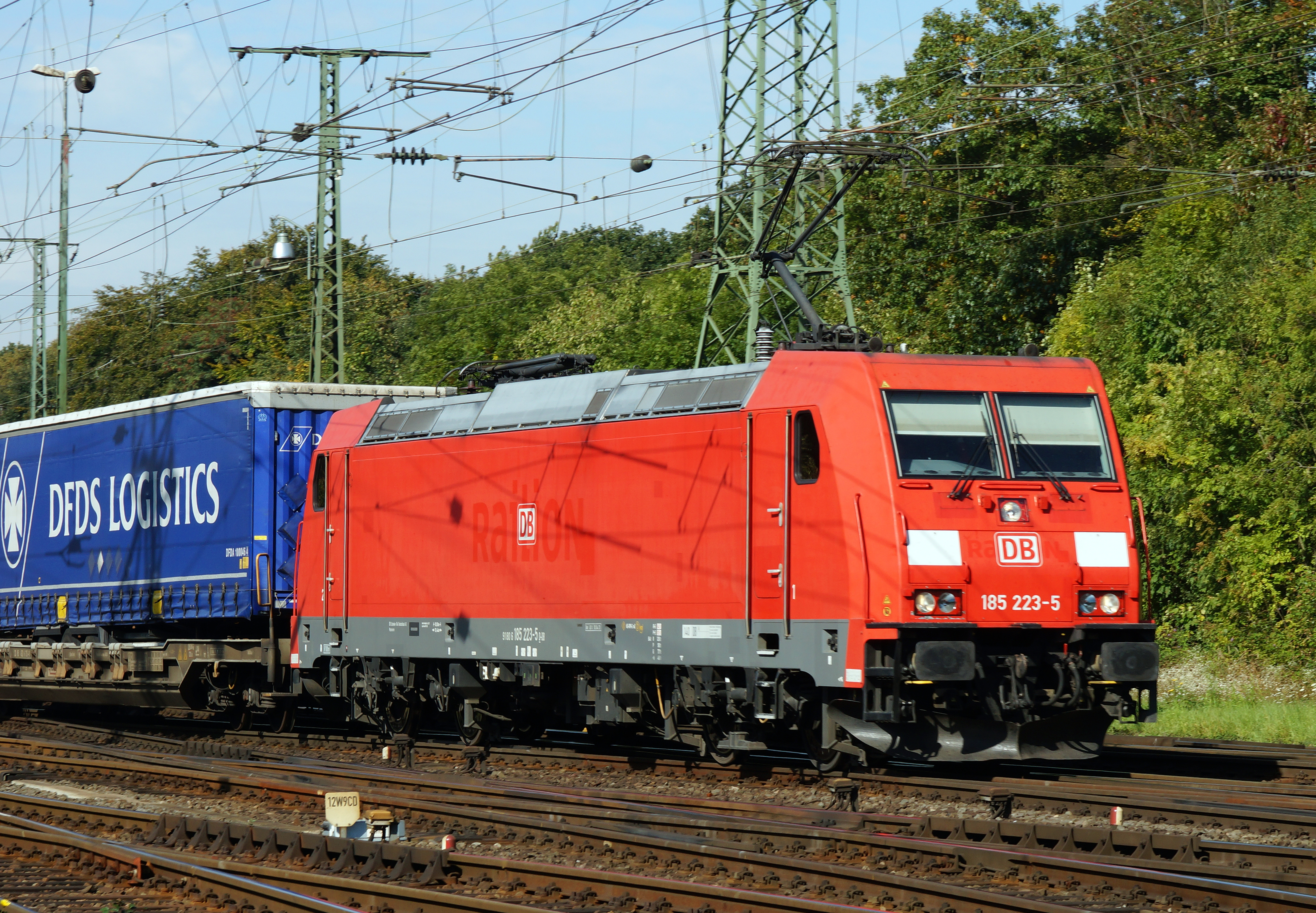 DBAG 185 223-5 in der Nähe vom Rangierbahnhof Gremberg.